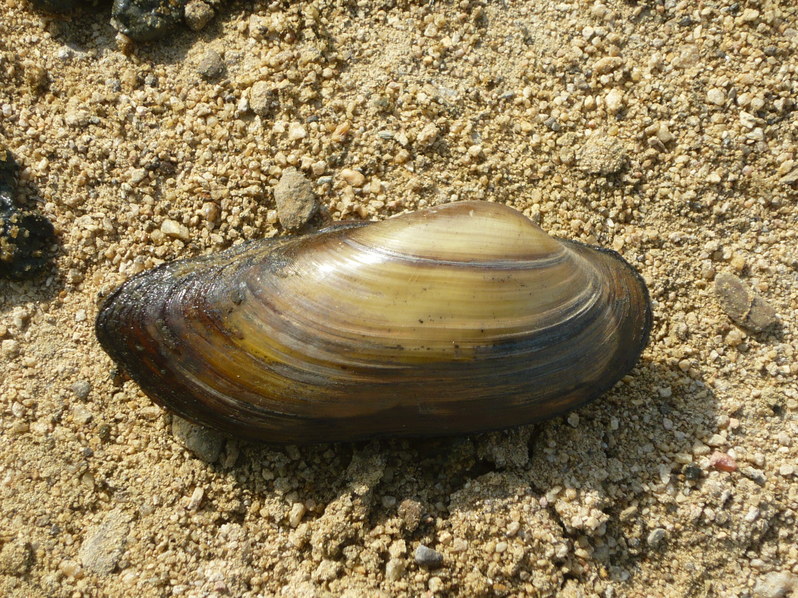 Korýtko maliarske odchytené na vodnej nádrži Ružiná 12. 10. 2019